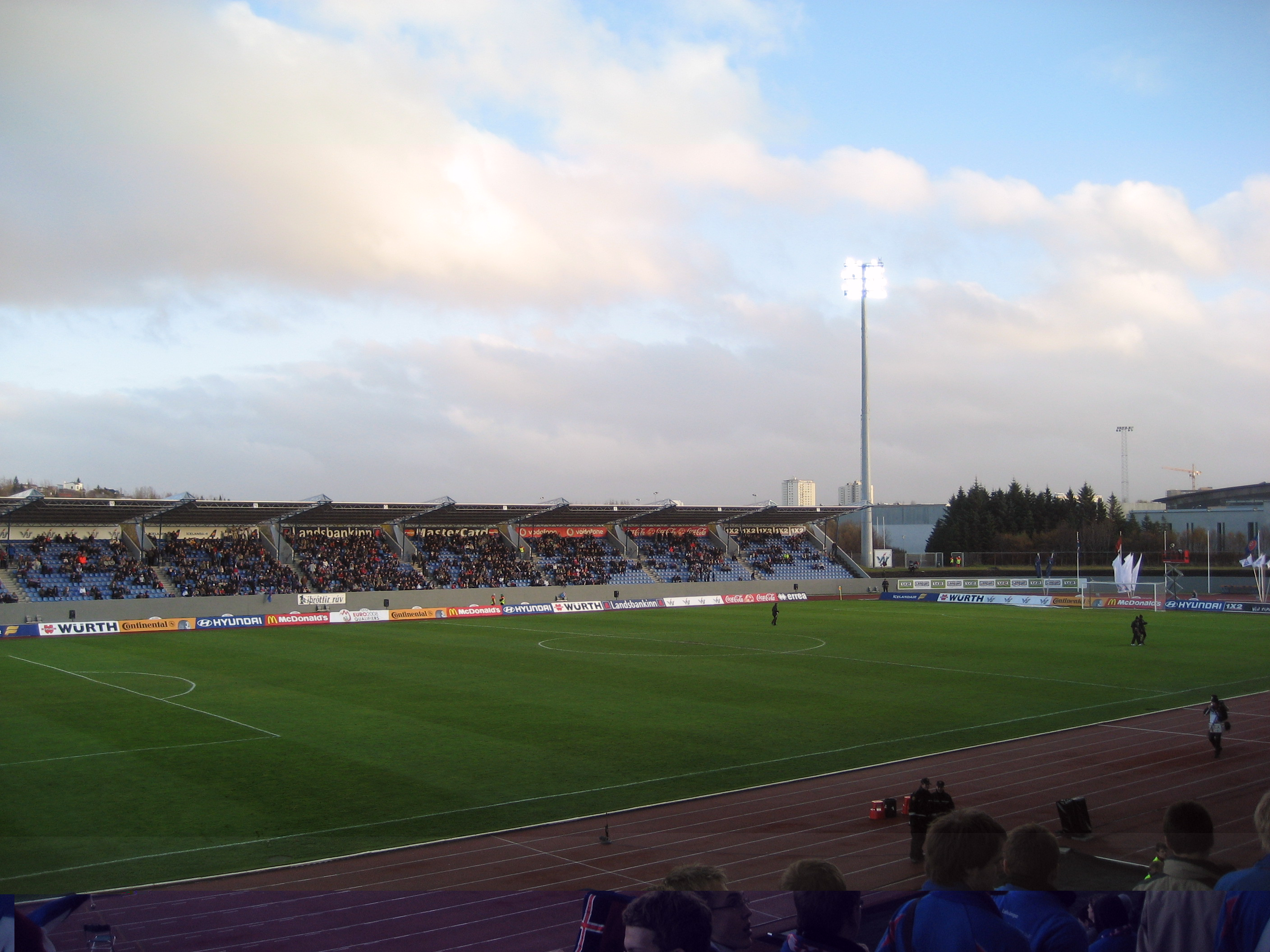 Laugardalsvöllur, Icelands national stadium.